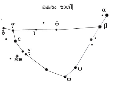 മകരം രാശി ഏകദേശ ചിത്രം